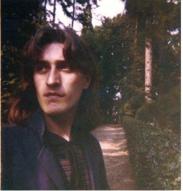 Fotografía de Lois Pereiro.